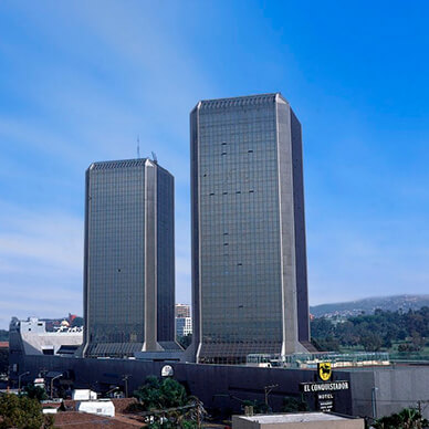 Grand Hotel Tijuana